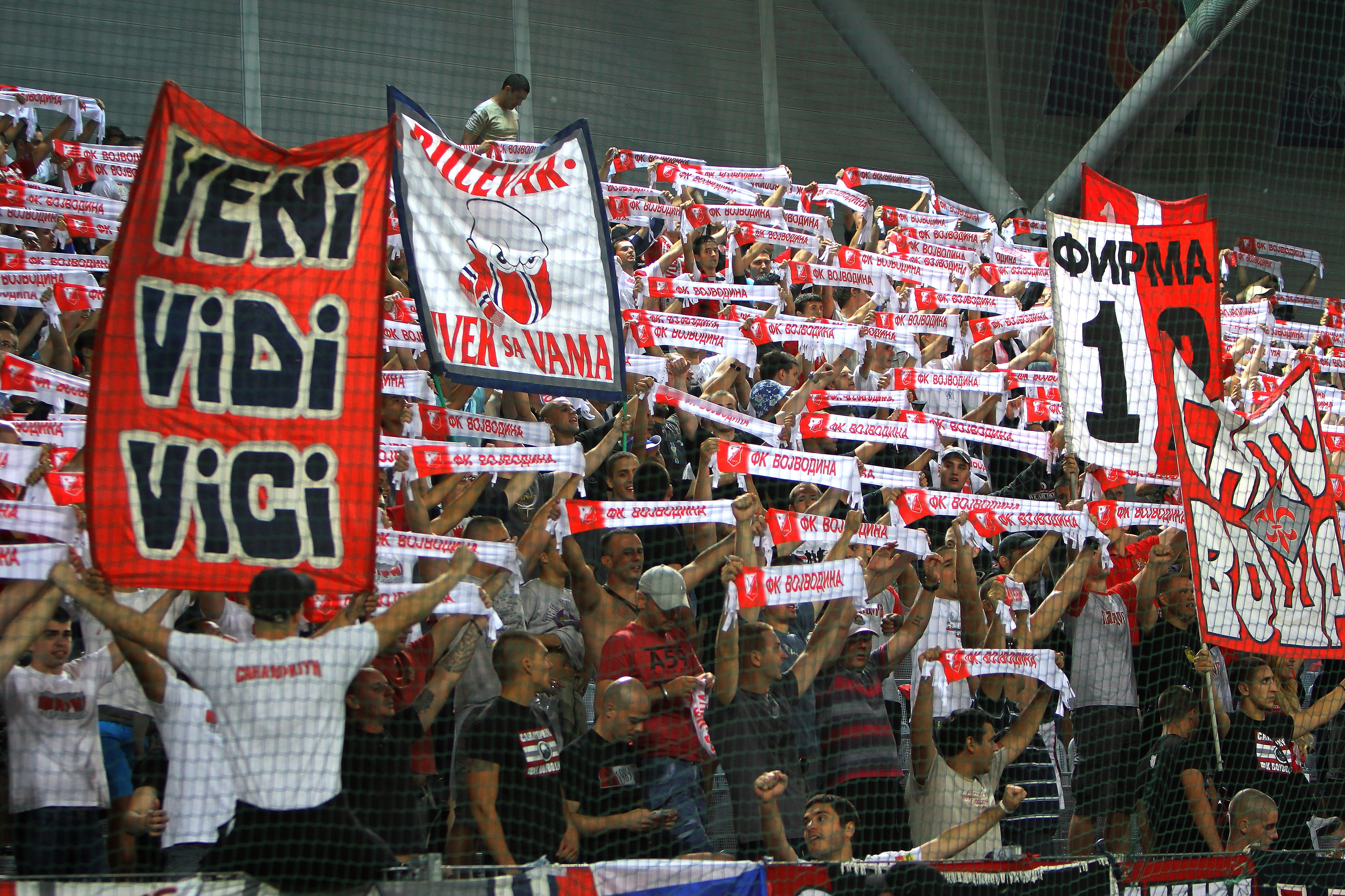 Novi Sad Fans